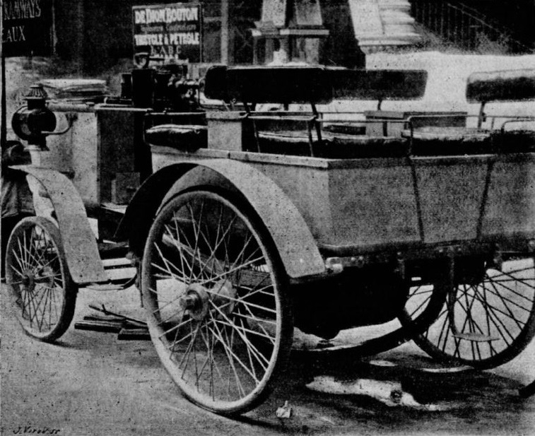 La voiture n°3 de Dion-Bouton du comte de Chasseloup-Laubat (dog-cart à vapeur 4 places) au départ de Paris-Bordeaux-Paris 1895 (arrêtée à Tours) - La Science Française, juin 1895, p.330